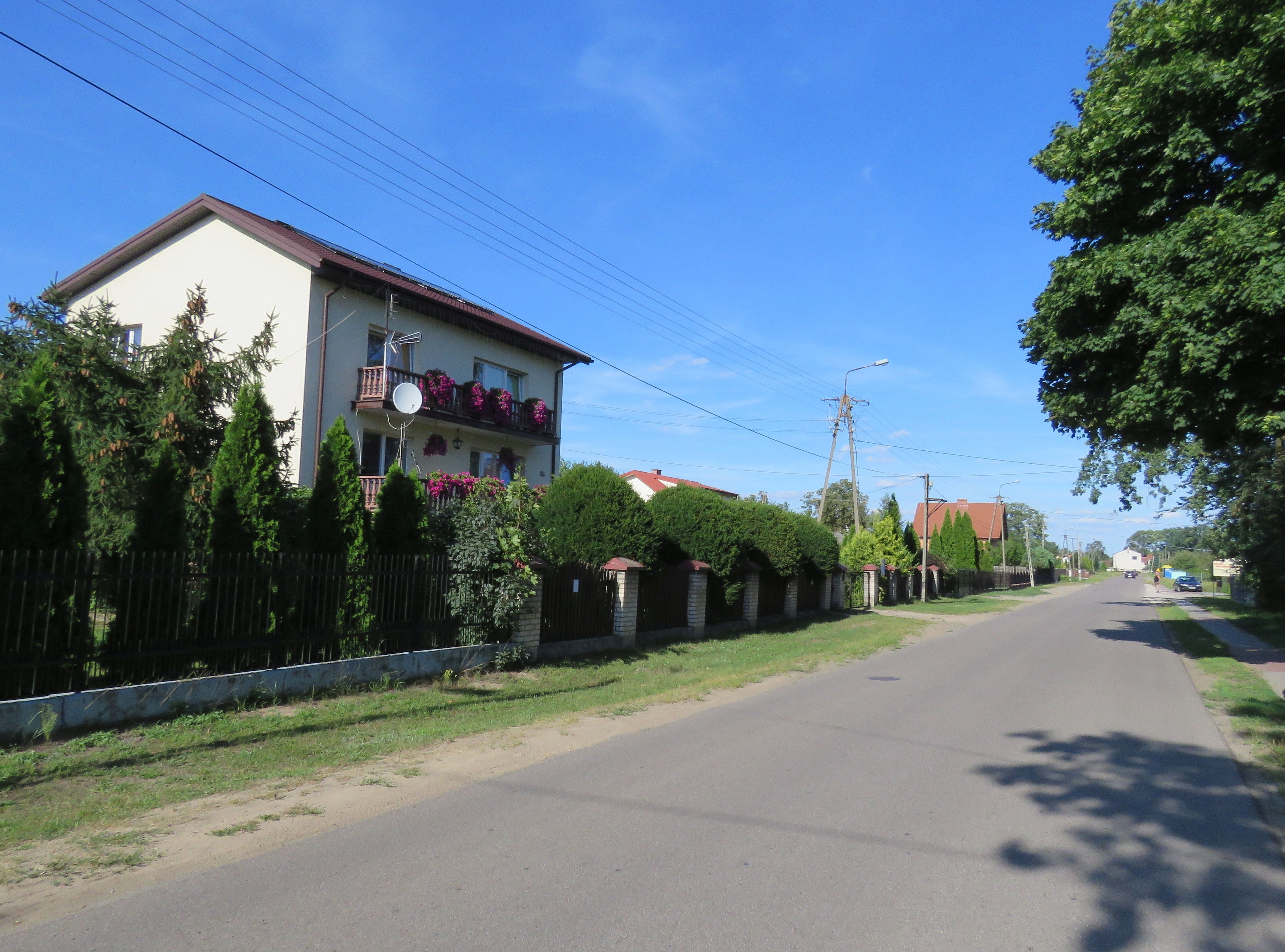 NOWY WILKÓW